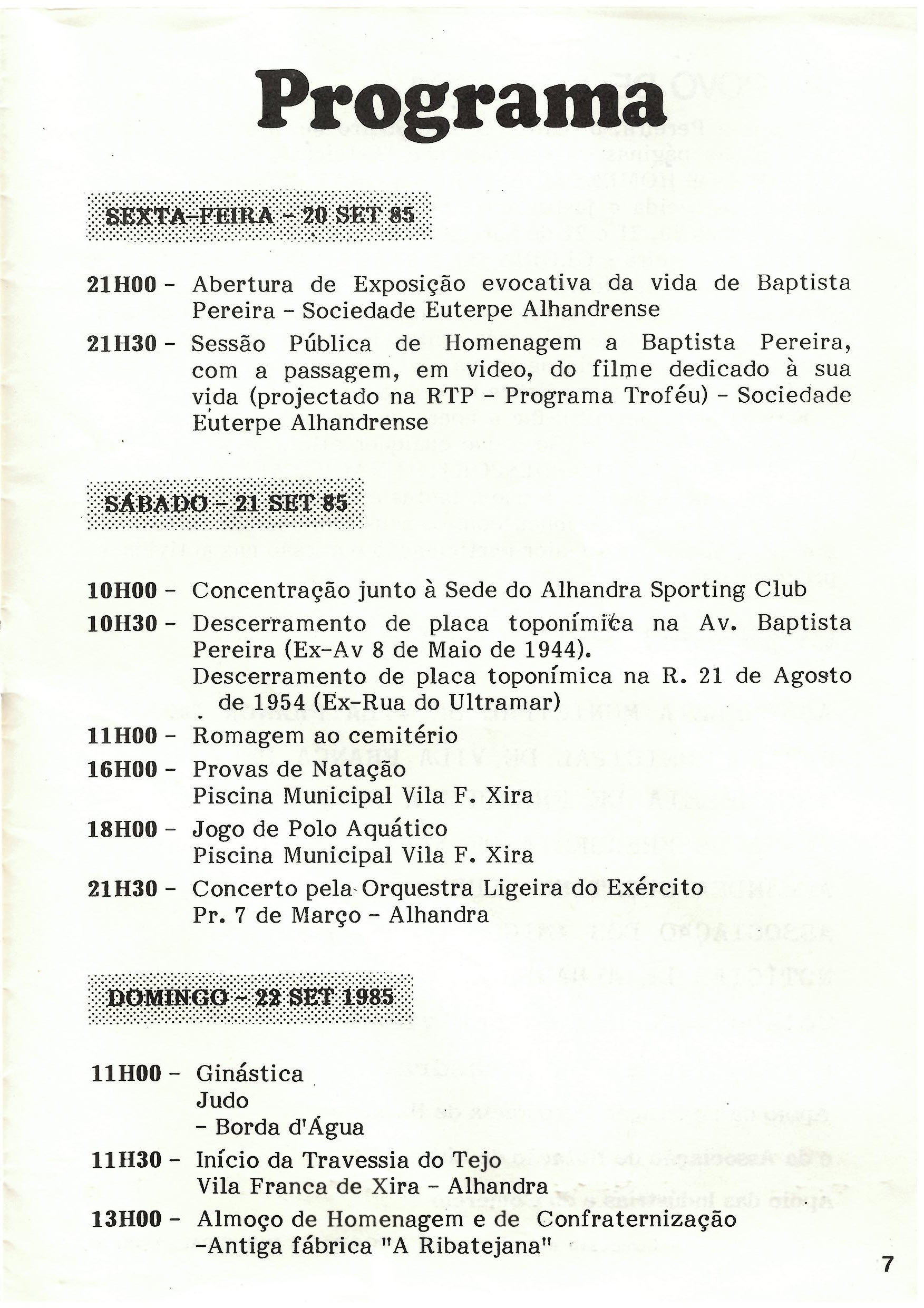 Programa dos três dias de homenagem a Baptista pereira.